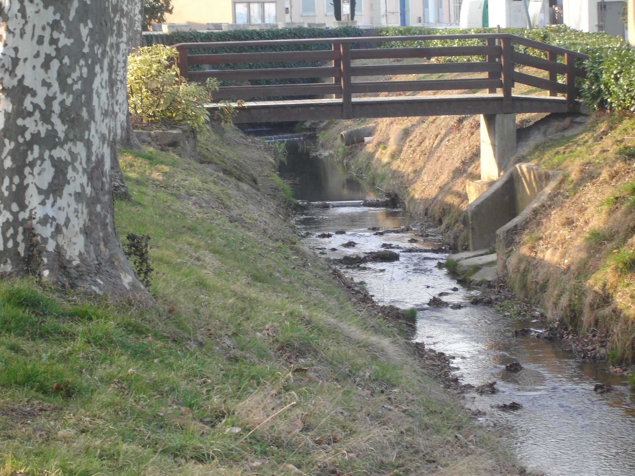 Simandres (69) : La passerelle en bois